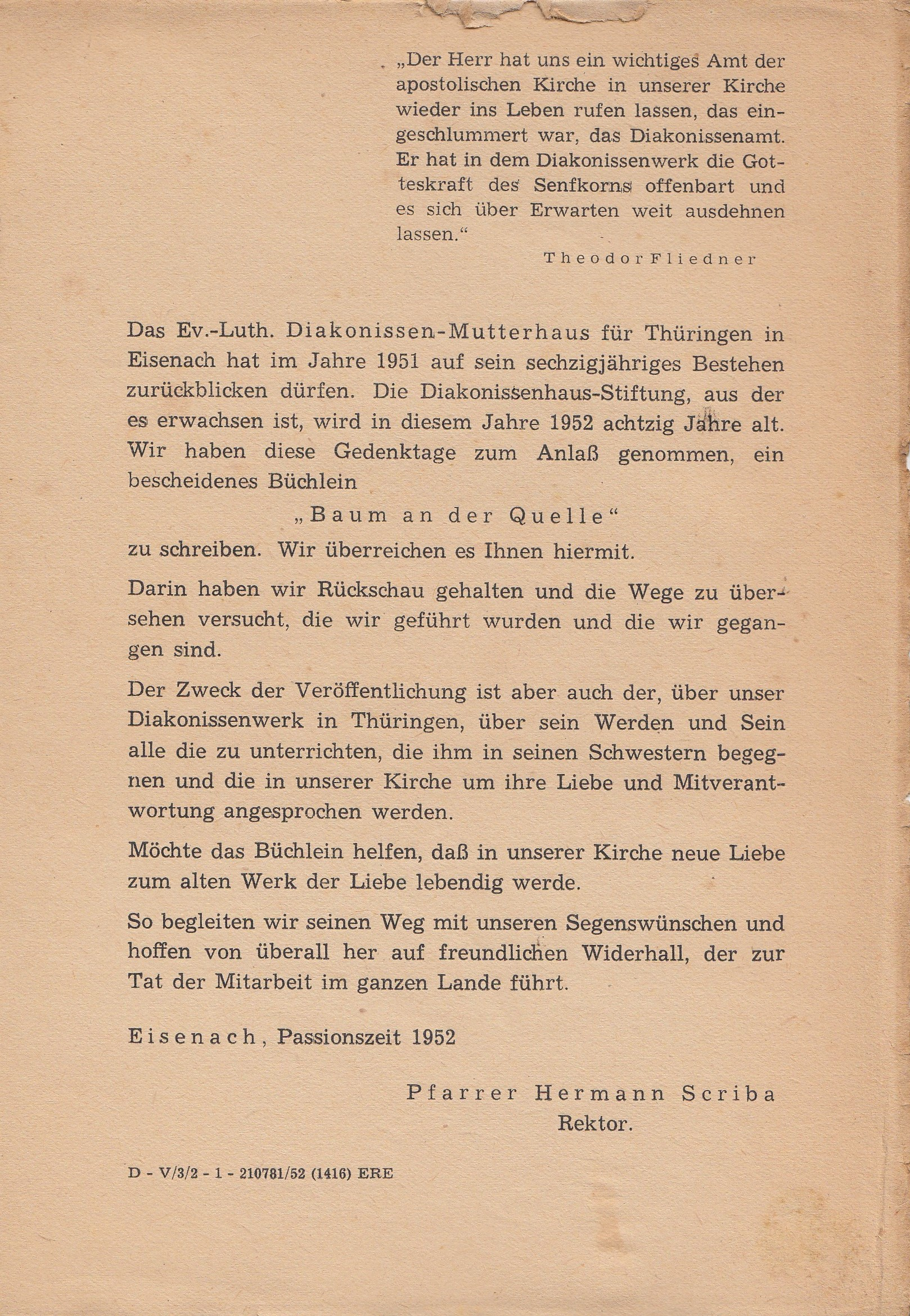 Werbezettel zu "Baum an der Quelle2